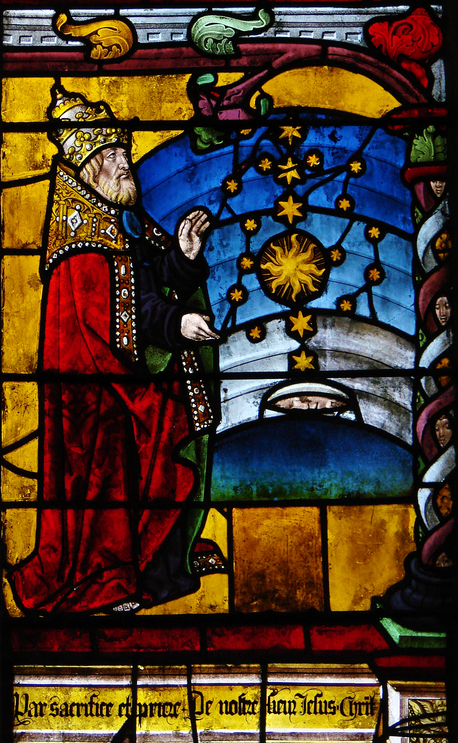 Vitrail de la Création, début du 16ème siècle, église de la Madeleine de Troyes. Les scènes illustrent le livre de la Genèse. Noter que Dieu porte le costume papal, notamment la tiare pontificale.